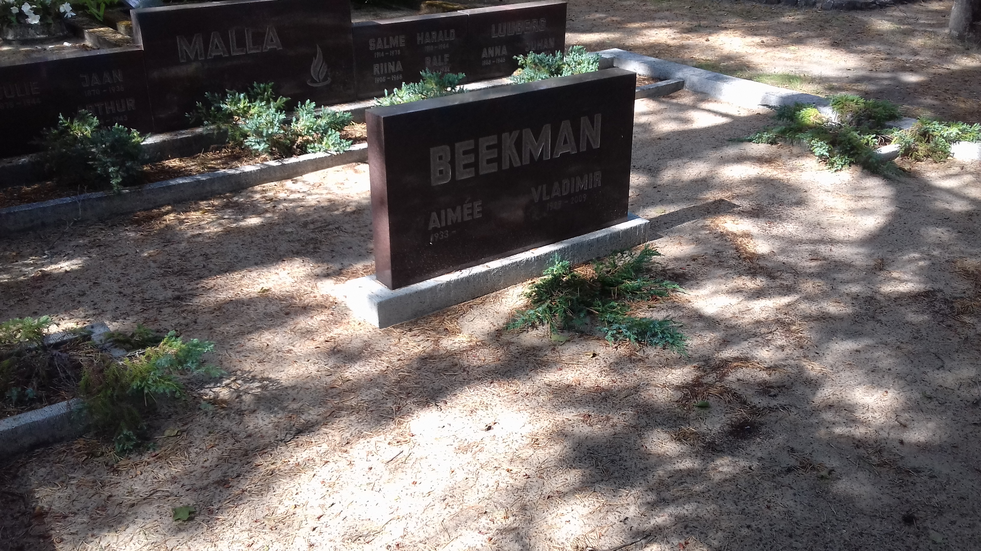 Vladimir ja Aimee Beekmani hauaplats Rahumäe kalmistul